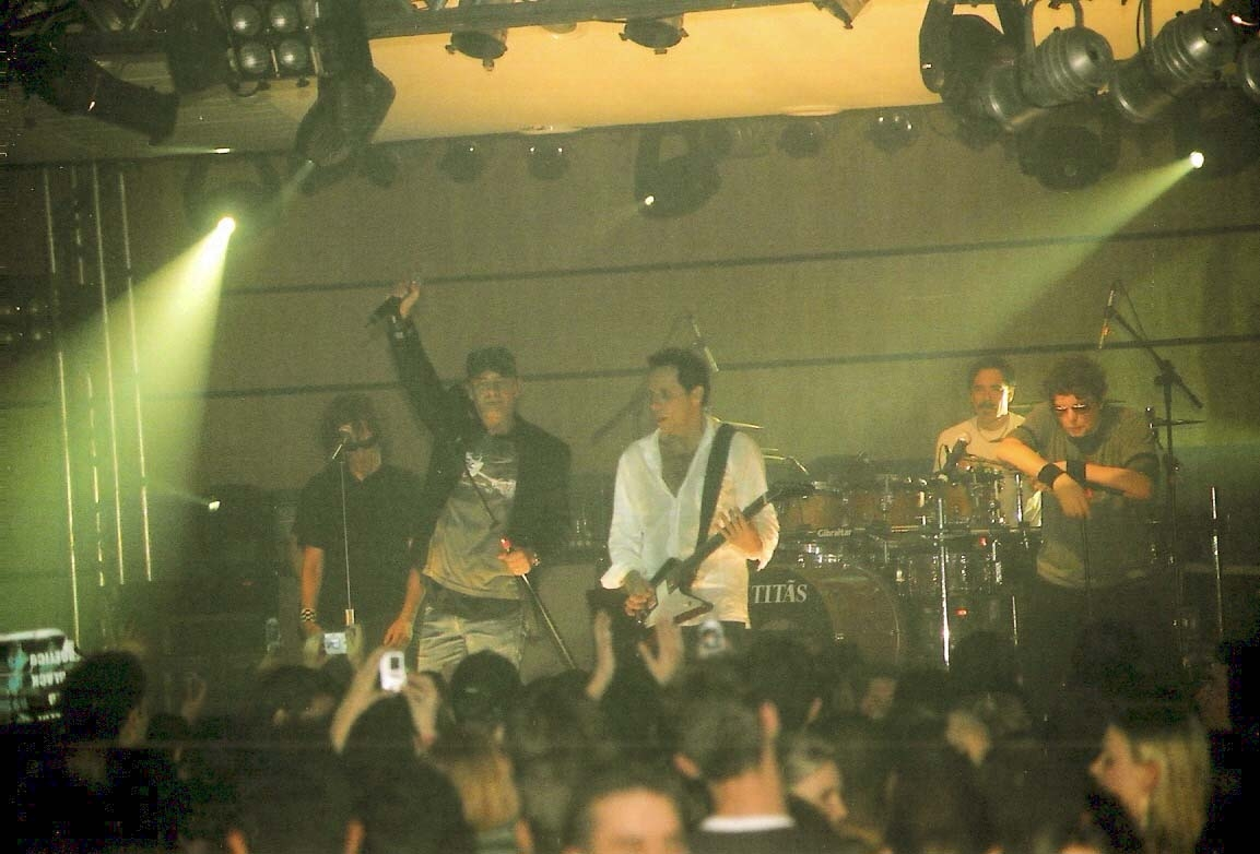 Banda Titãs durante concerto em Foz do Iguaçu, em 2006.